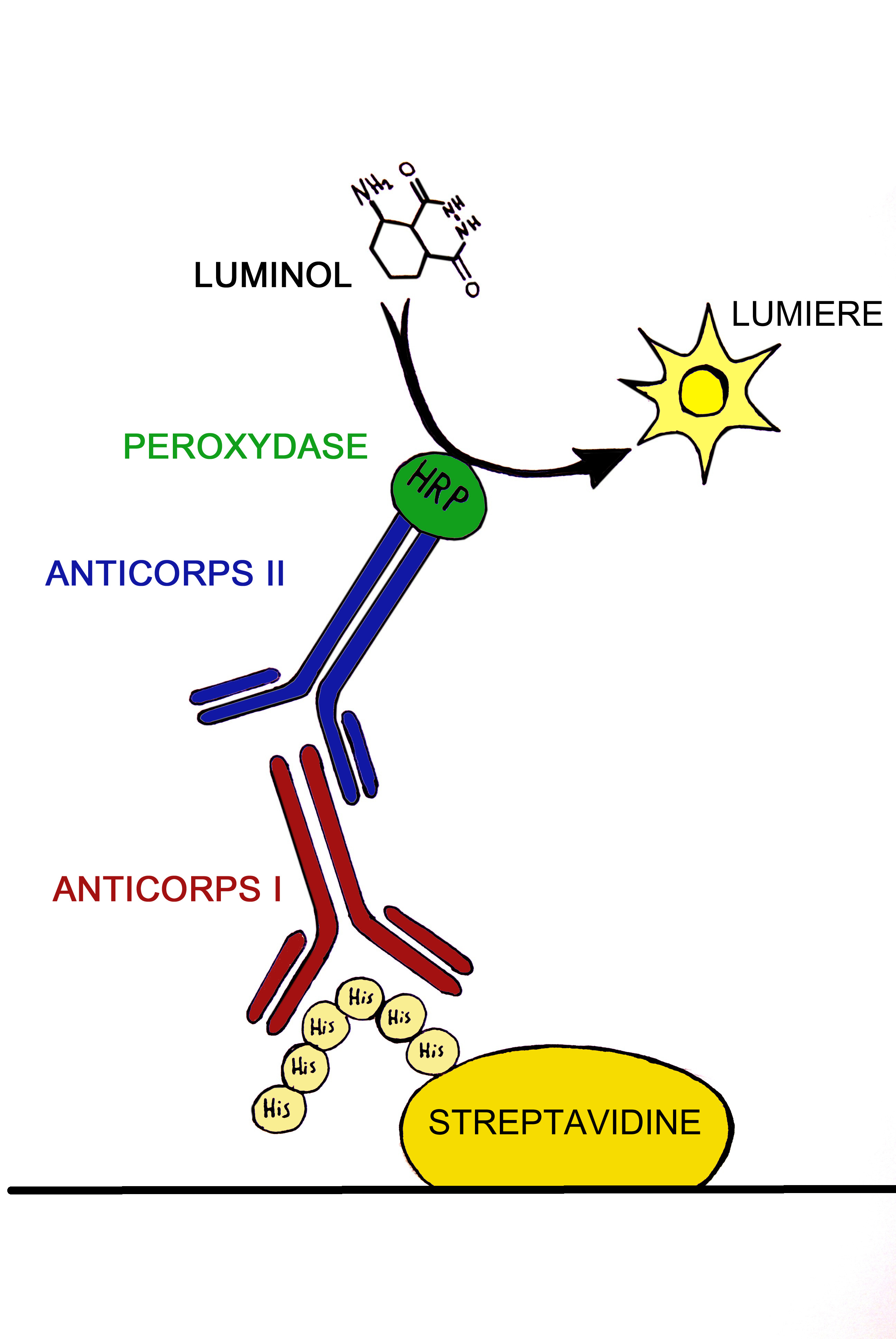 Le principe de l’immuno-détection couplé à une ECL. Exemple pour le cas d'une détection de la streptavidine. Le principe est de fixer un anticorps primaire sur notre protéine attachée à une membrane de nitrocellulose, en l’occurrence l’anticorps se fixe sur la queue des six histidines (ajout artificiel). Un anticorps secondaire se fixe au premier. Celui-ci possède une peroxydase qui permettra au luminol d’émettre de la lumière lors de sa catalyse.